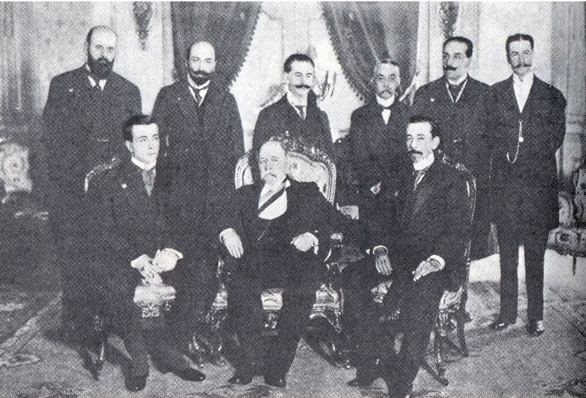 El presidente Ramon Barros Luco junto a los cancilleres del Pacto ABC, José Luis Murature (Argentina) y Lauro Müller (Brasil)